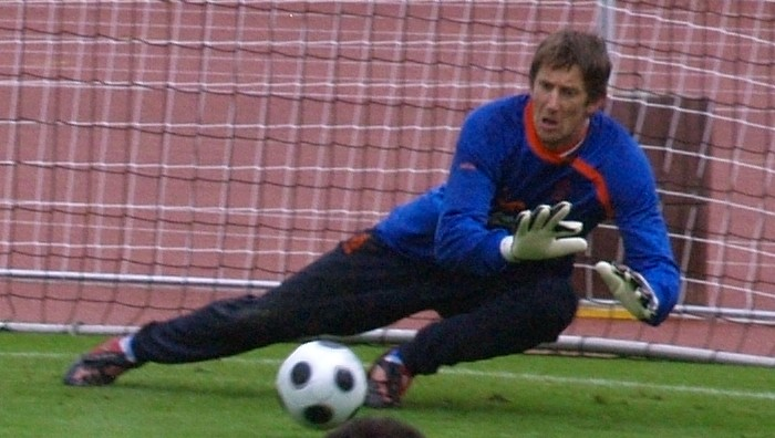 Edwin van der Sar